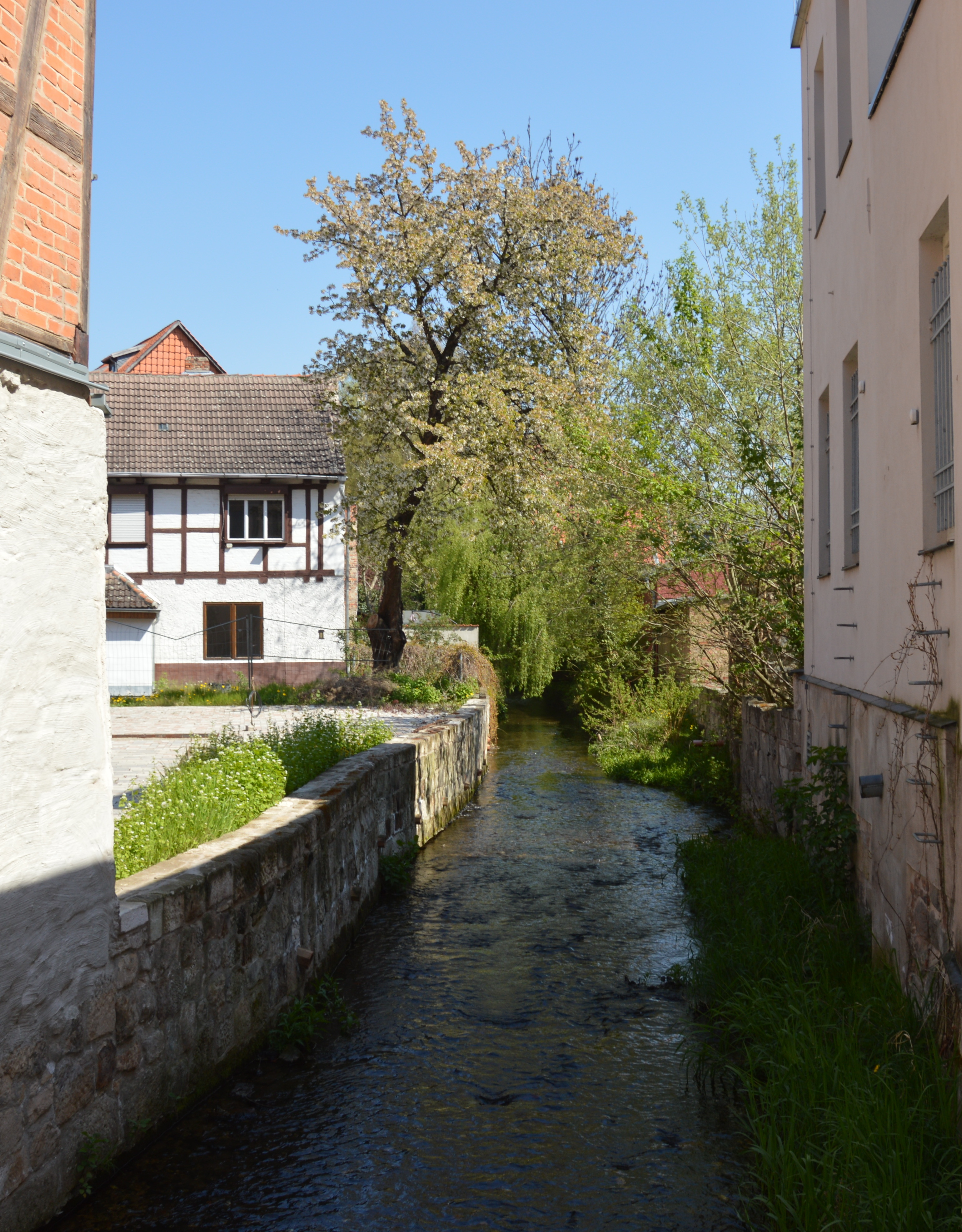 Mühlgraben Quedlinburg hinter der Straße Pölle